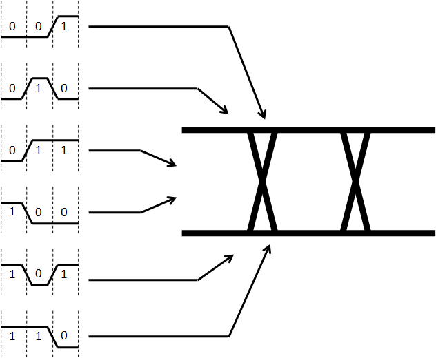 Template:Concepto del diagrama del ojo